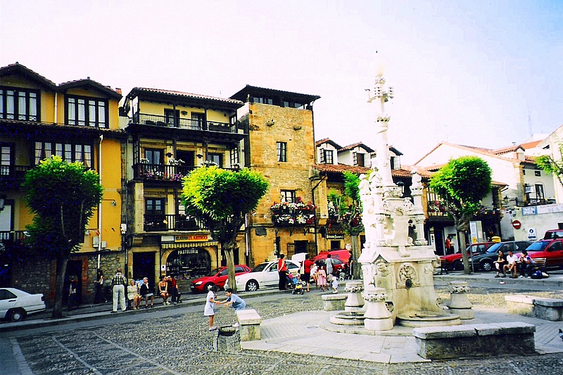 Comilles - Font de "Los tres caños" al centre de la ciutat